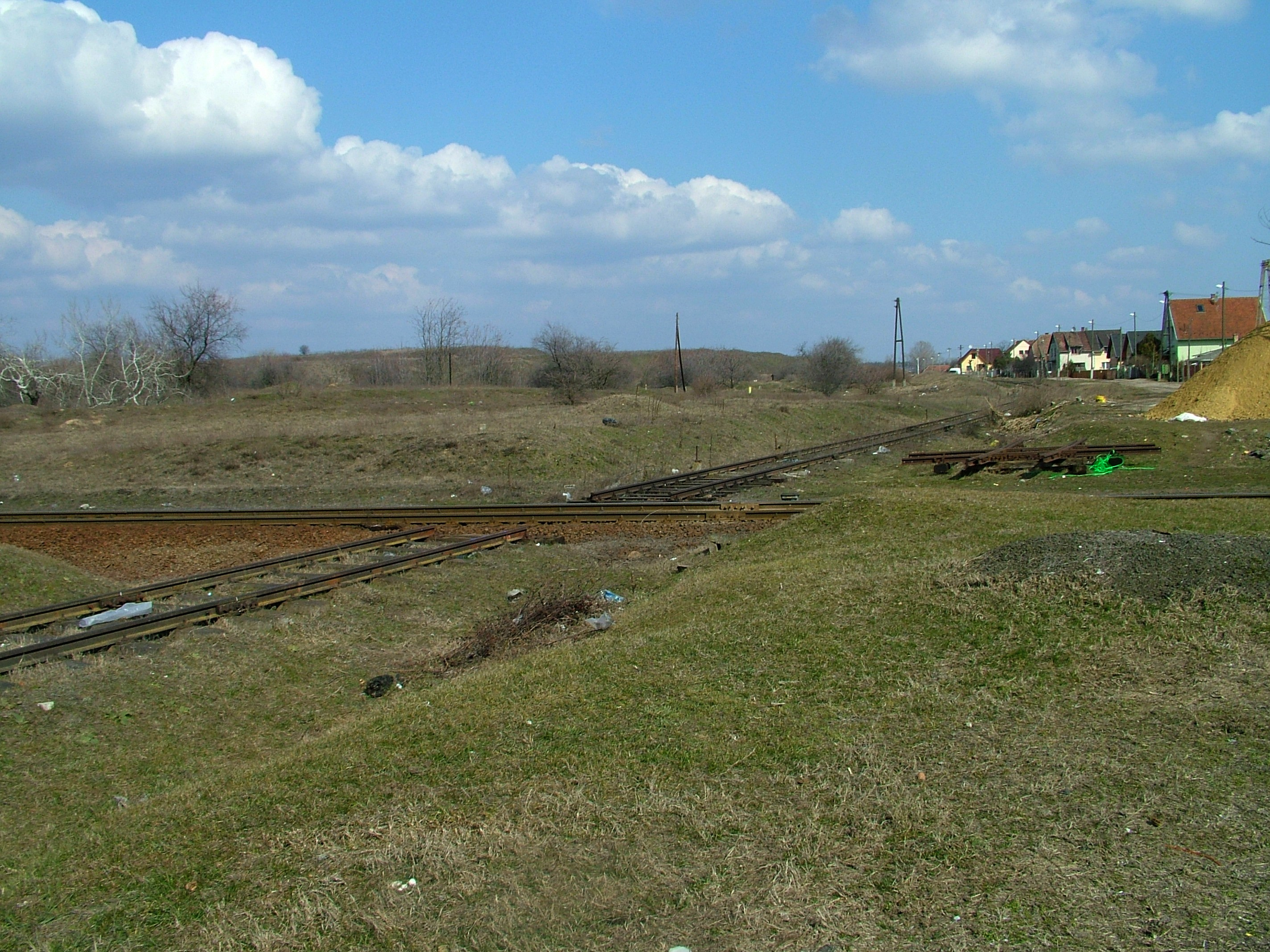 Cséry telep 2010-ben a Nagykőrösi út felől